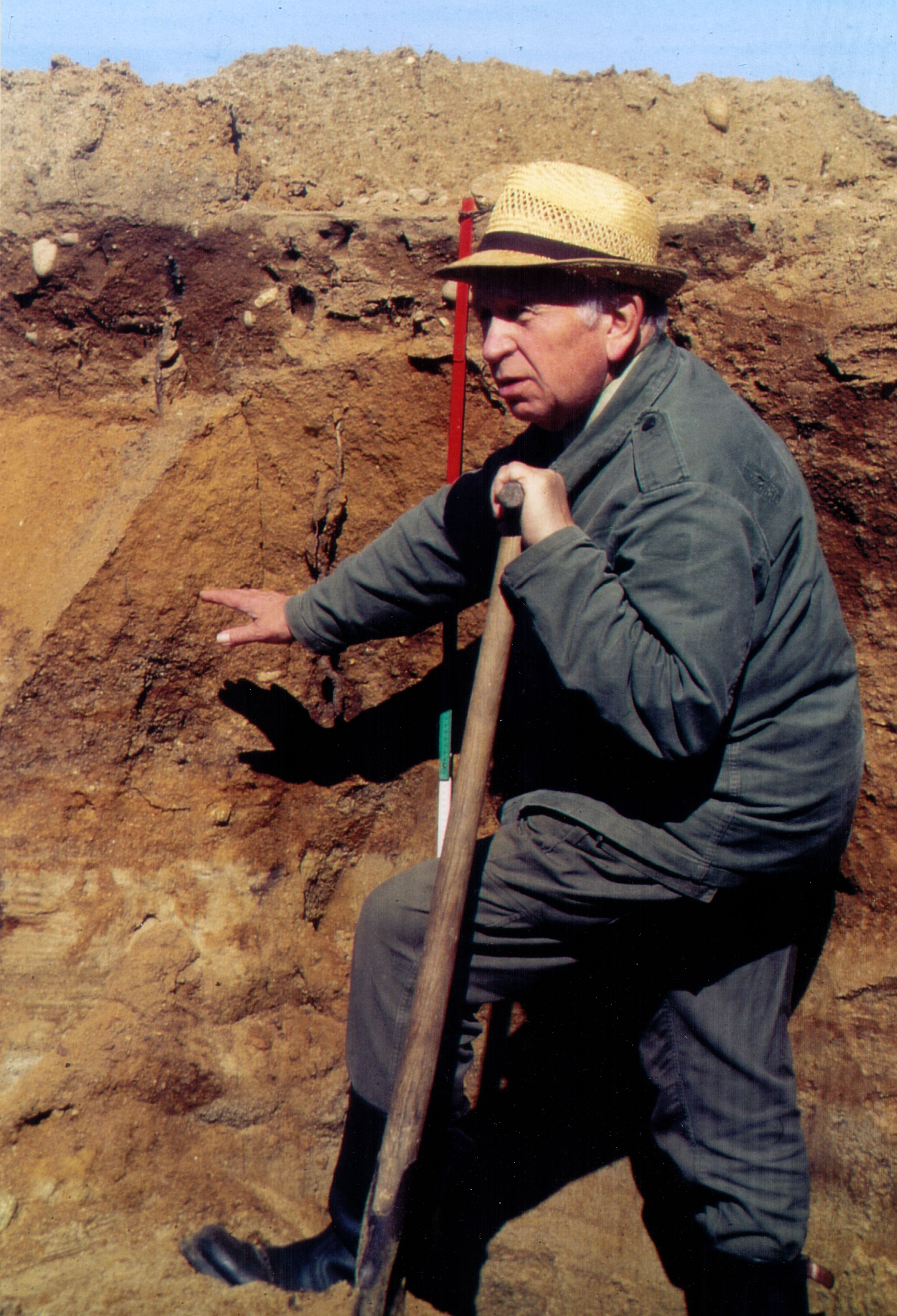 Brunk Meyer (1926-2005), deutscher Bodenkundler